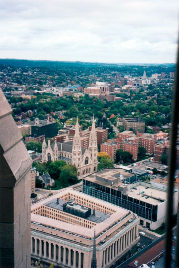 Pittsburgh, Pennsylvania, USA